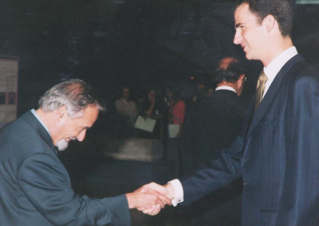 Ruizanglada saludando a Su Majestad el Principe Felipe